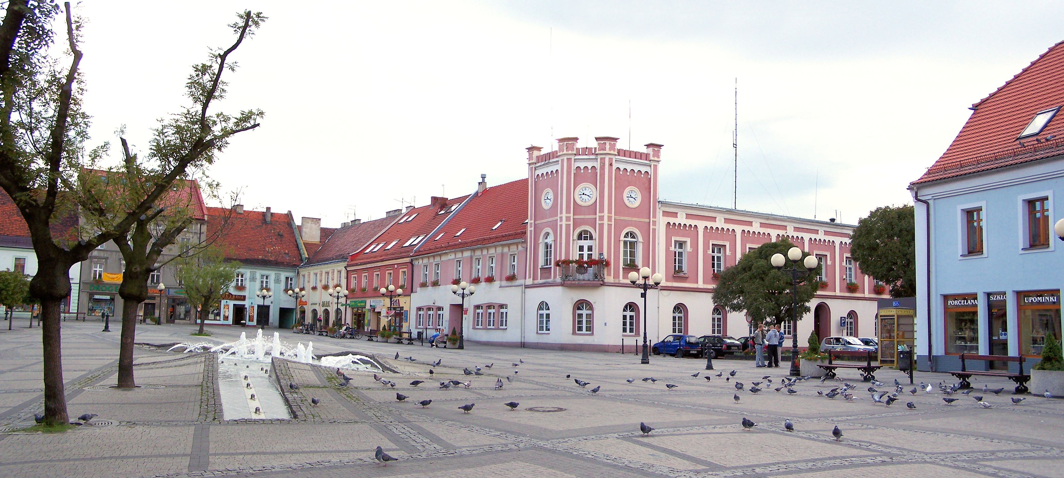 Rynek z ratuszem w Mikołowie.